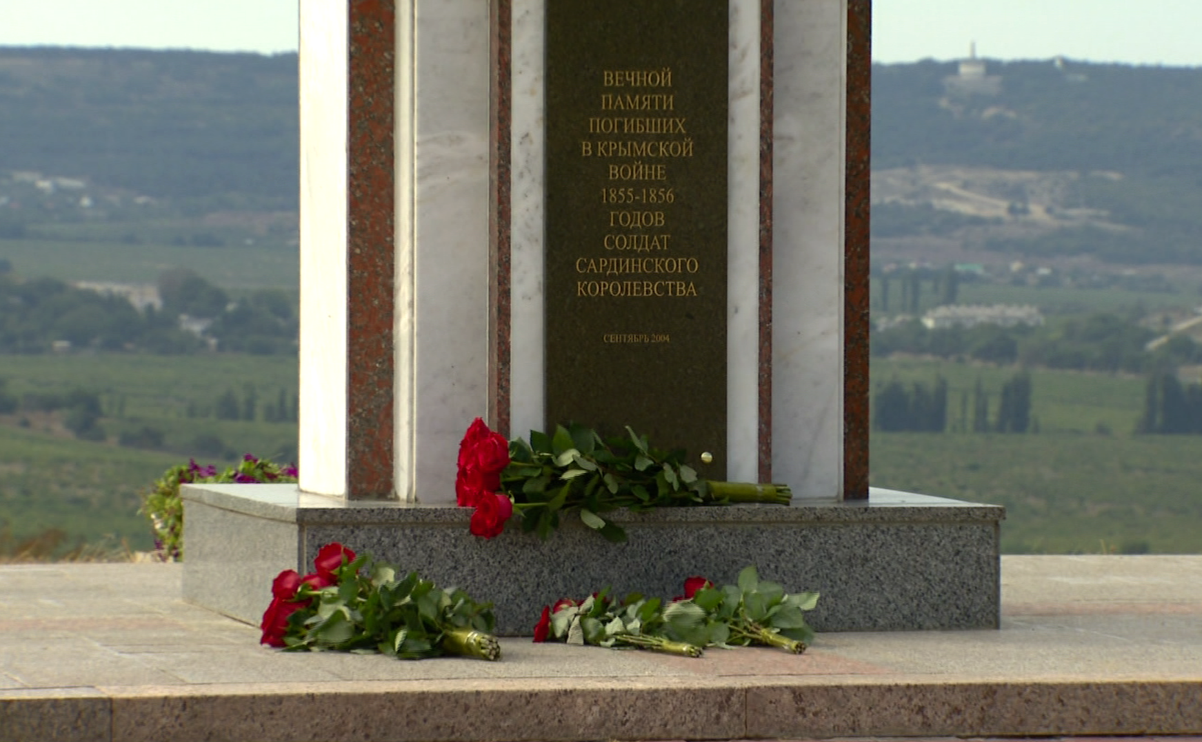 Владимир Путин встретился в Крыму с Сильвио Берлускони, находящимся в России с частным визитом